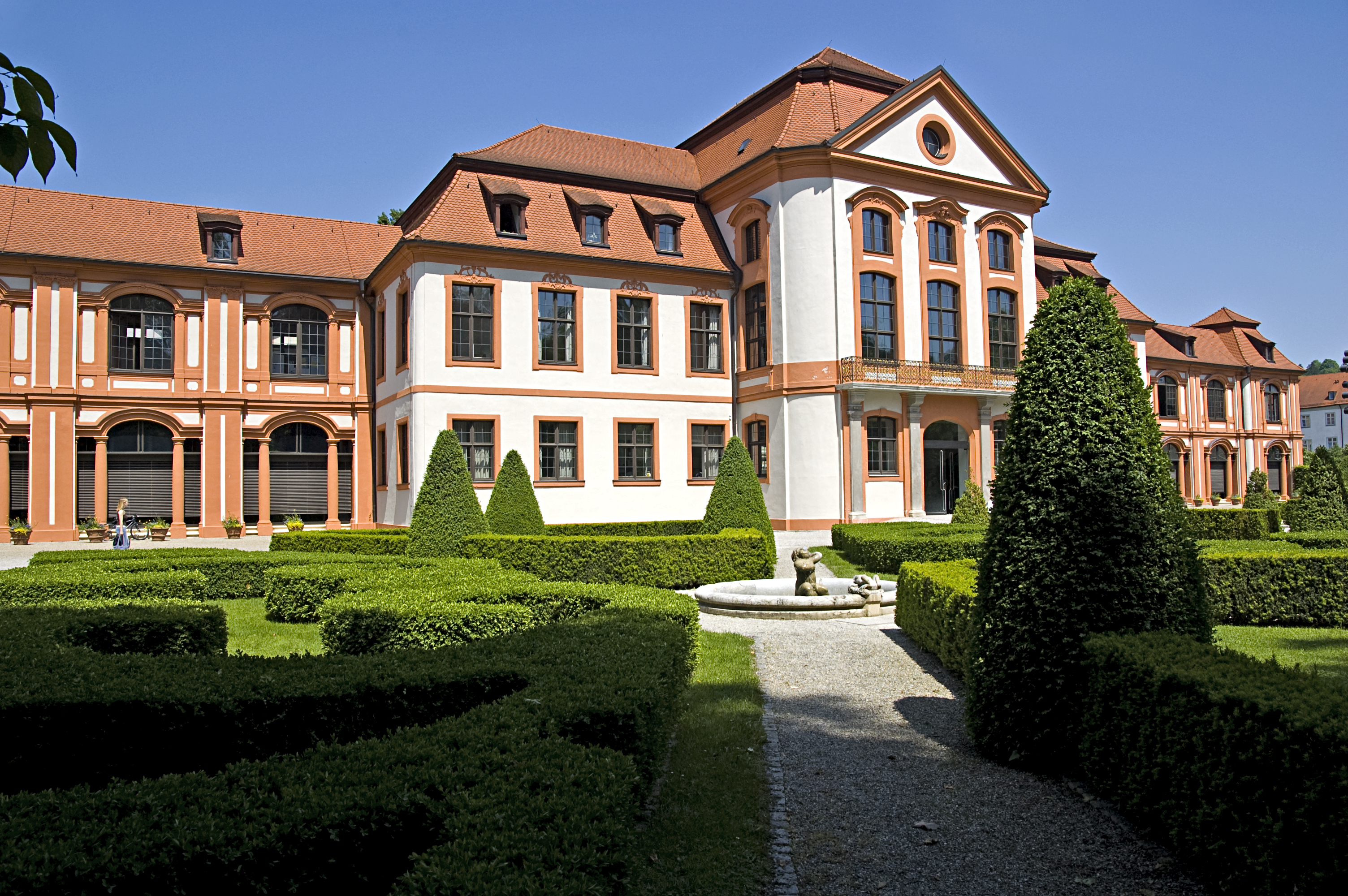 Ehemalige Fürstbischöfliche Sommerresidenz, jetzt Verwaltung der Katholischen Universität Eichstätt-Ingolstadt